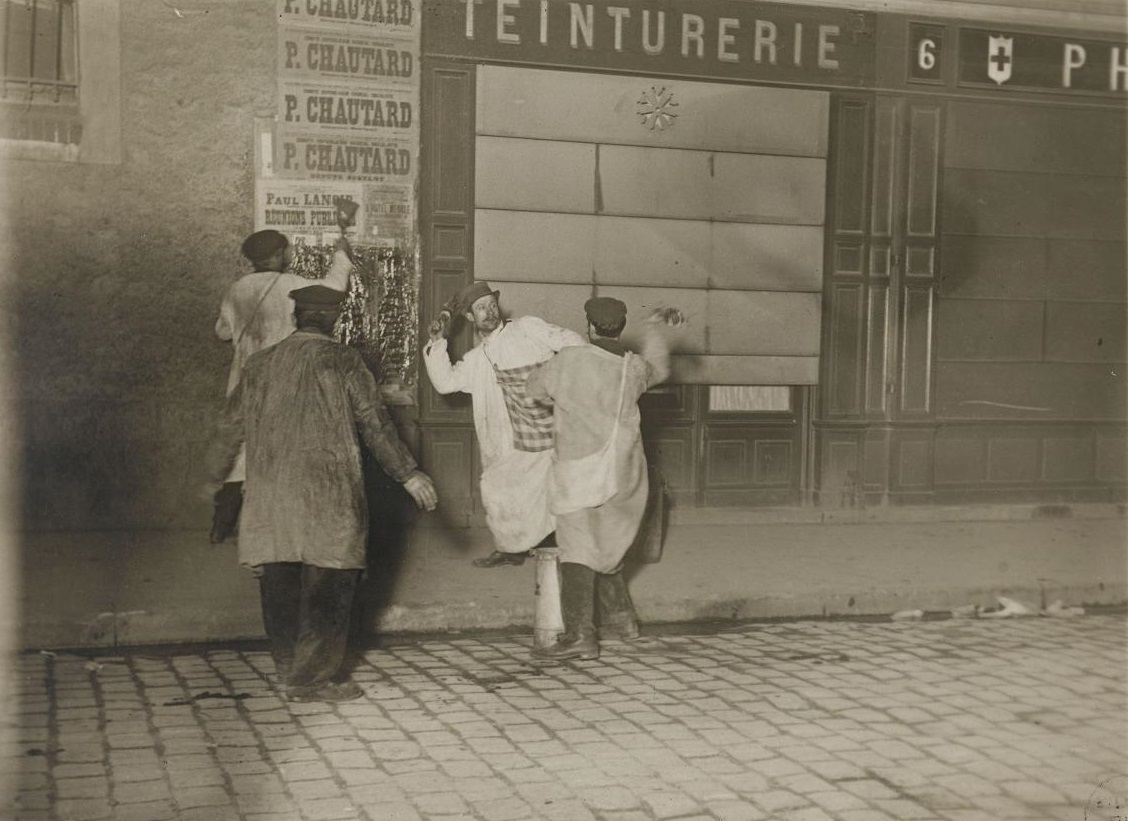 "Batailles d'afficheurs" lors des élections législatives de 1910 dans la première circonscription du 15e arrondissement de Paris.